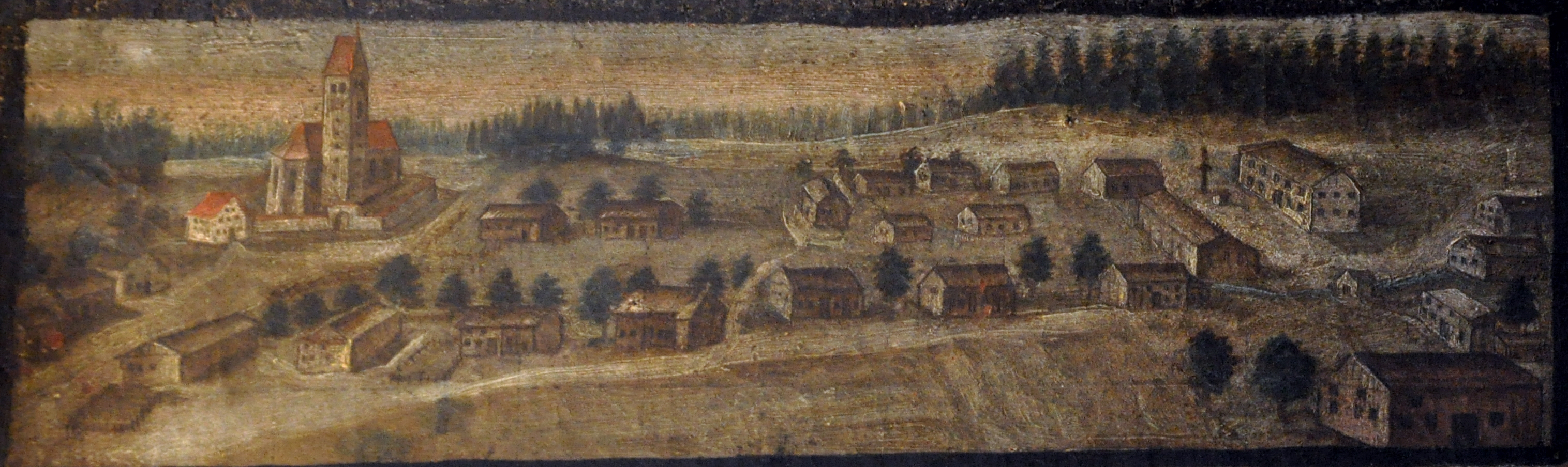 Karte der waldburgischen Herrschaft Kißlegg, 1720, Detail Waltershofen mit Pfarrkirche